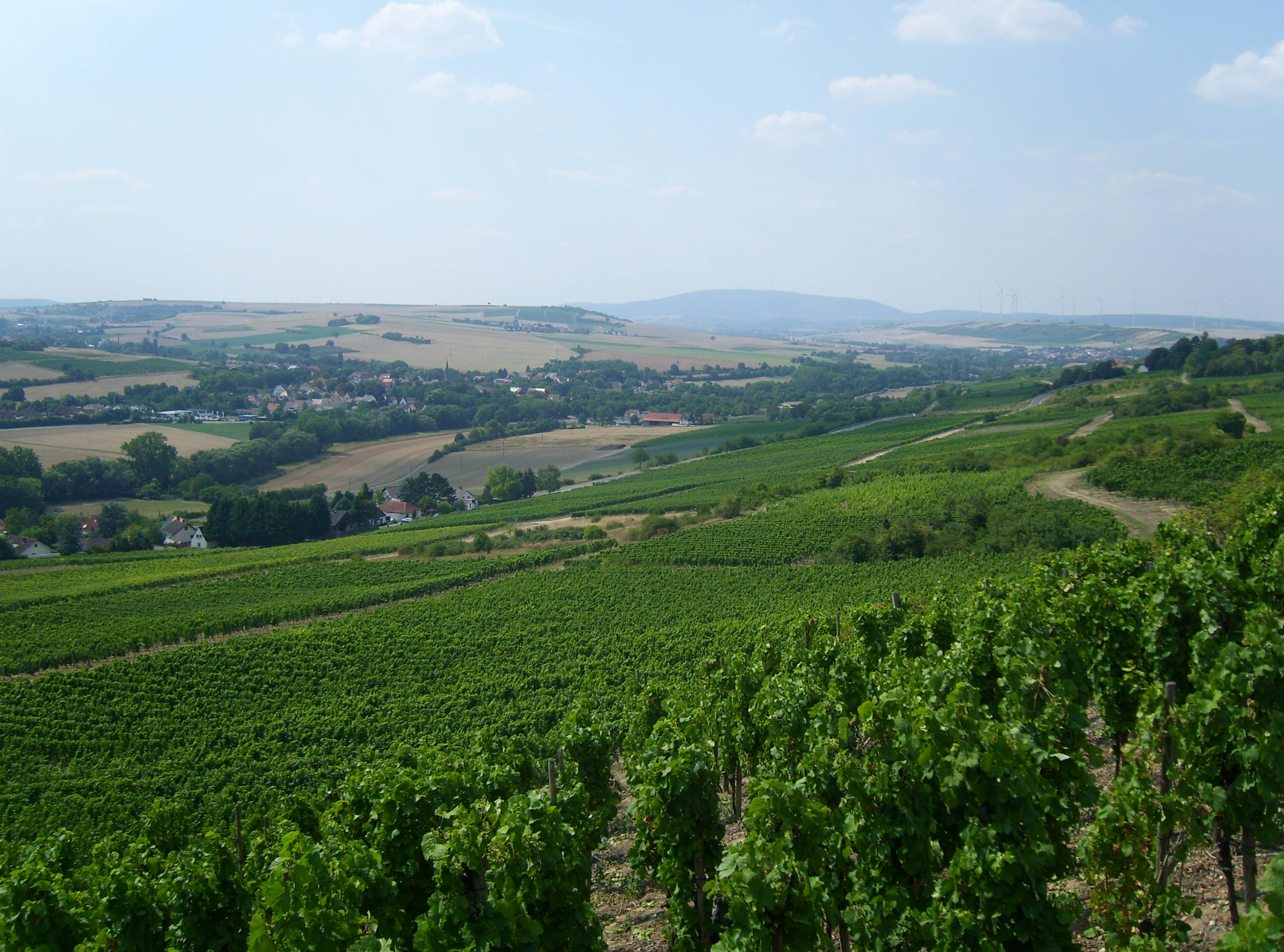 Donnersberg (687 m) und Mittleres Pfrimmtal (Alzeyer Hügelland) vom Ehrenmal Zellertal (etwa 240 m); links im Vordergrund Hanglagen von Niefernheim, dahinter die Pfrimm von Harxheim flussaufwärts bis Albisheim und dann Richtung Donnersberg abknickend; links des Donnersbergs der Saukopf/Gauberg (um 300 m) mit Immesheim am Hang, rechts das Hungerbergplateau (bis 303,2 m; Windkraftanlagen) vor dem Kuhkopf im Nordpfälzer Bergland (430 m)